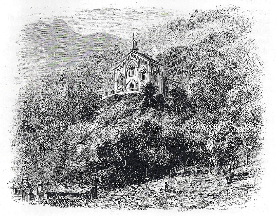 Храм вальденсов в коммуне Ангронья в Пьемонте. Гравюра неизвестного автора. Вероятно XVIII век.